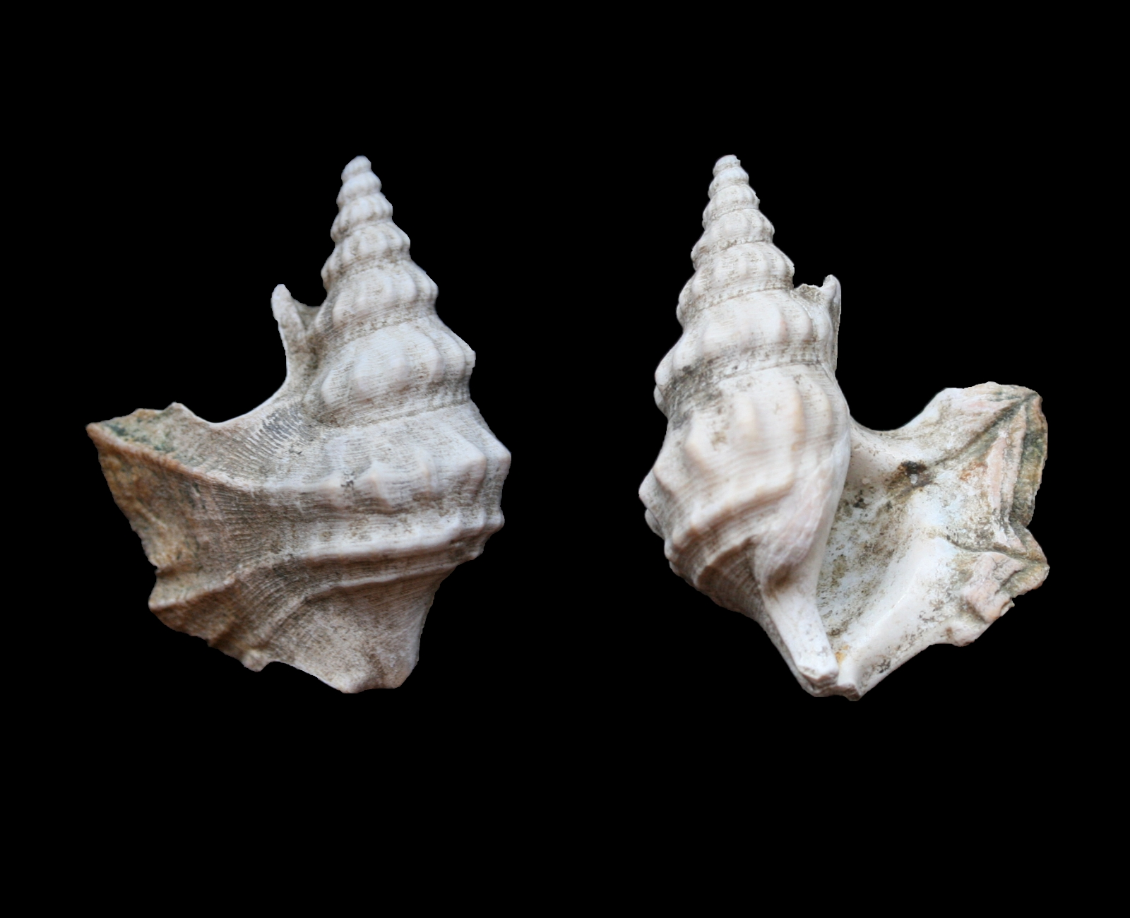 Aporrhais pespallecani .